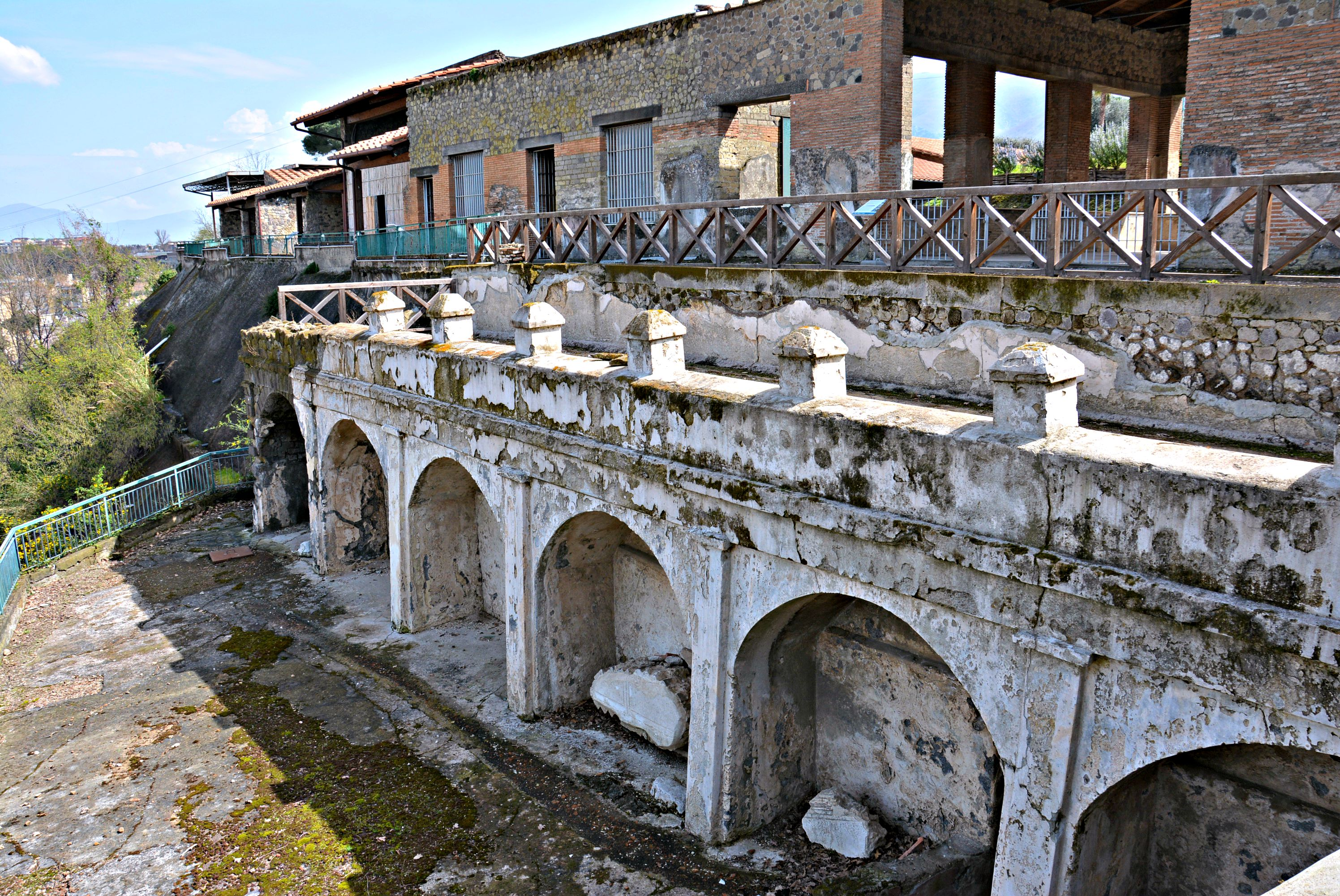 Villa Arianna, Stabia - MIBAC This is a photo of a monument which is part of cultural heritage of Italy.